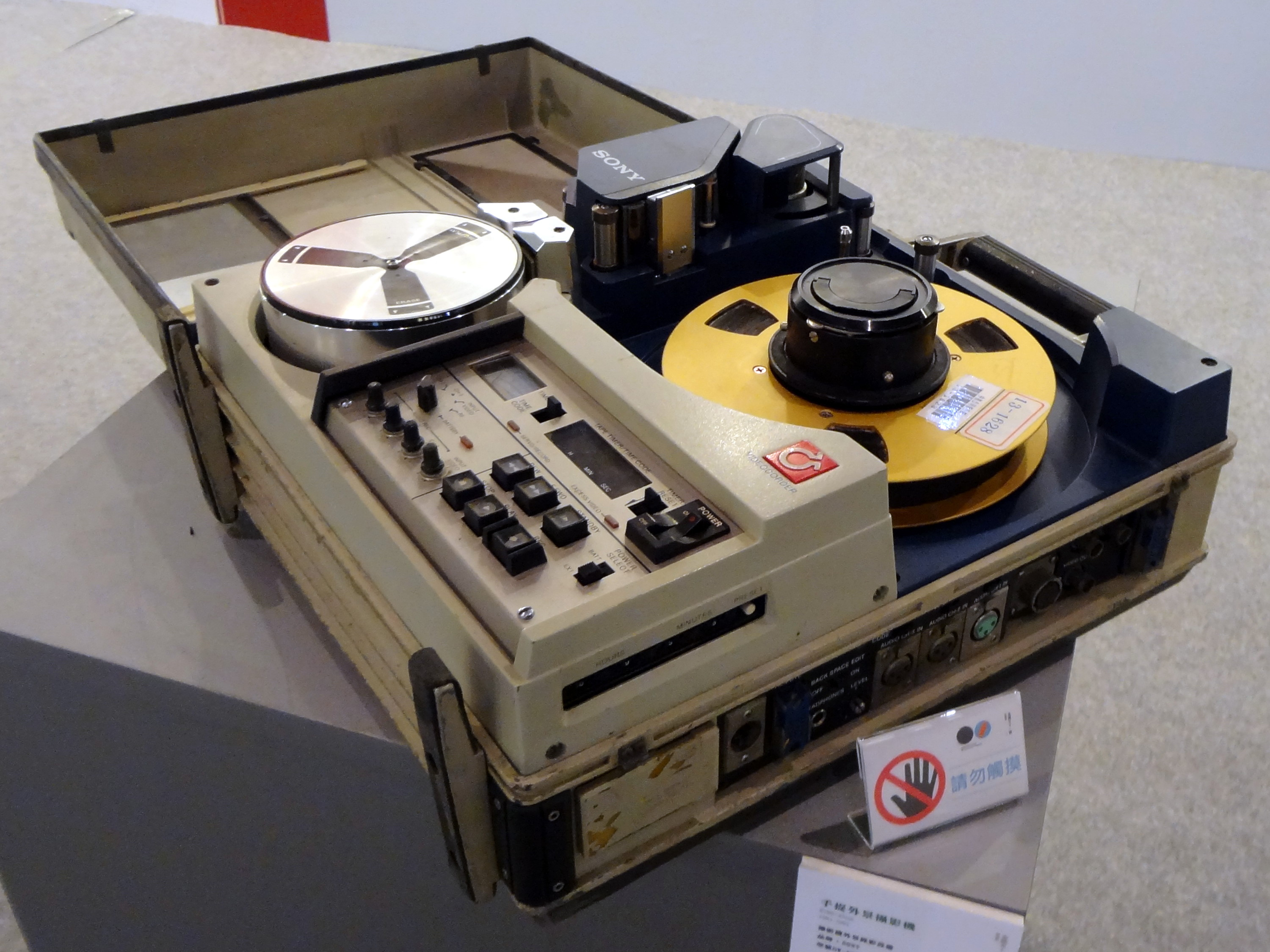 松山文化創意園區「金鐘五十．響 特別展」展示品：1981年至1991年，中國電視公司使用的Sony手提外景1吋帶錄放影機BVH-500。內附1吋錄影帶1捲。